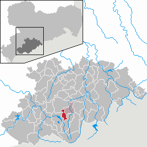 Scheibenberg im Erzgebirgskreis, Sachsen